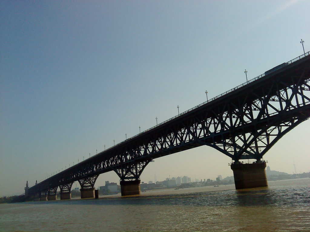 Nanjing Yangtze River Bridge